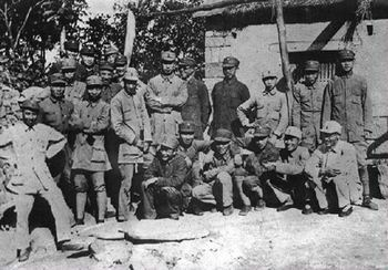 罗荣桓与陈光在鲁南天宝山区的挑峪村，主持召开了第115师高级干部会议，二排右四为罗荣桓。